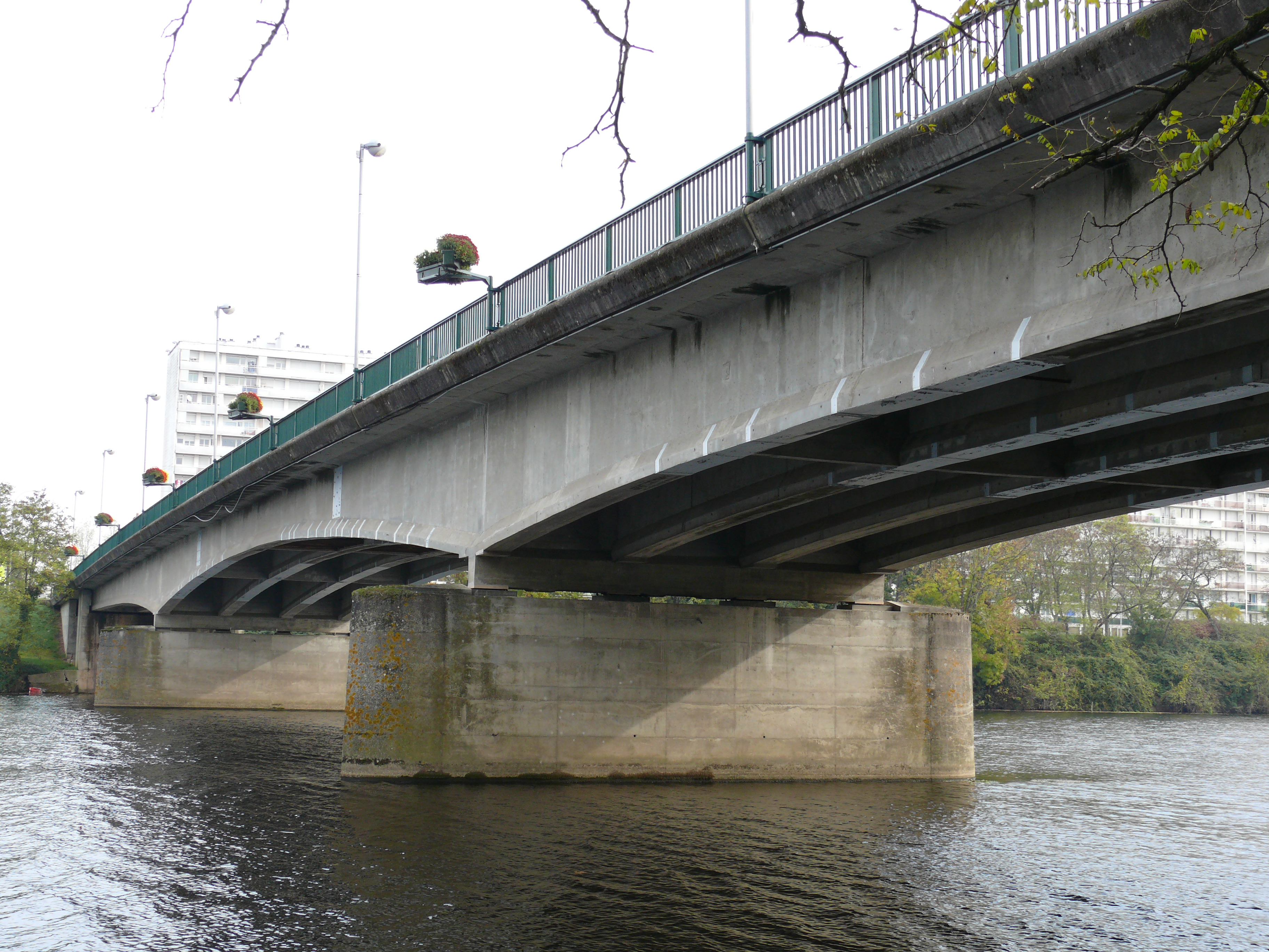 Châtlerault - Pont du Maréchal-Lyautey